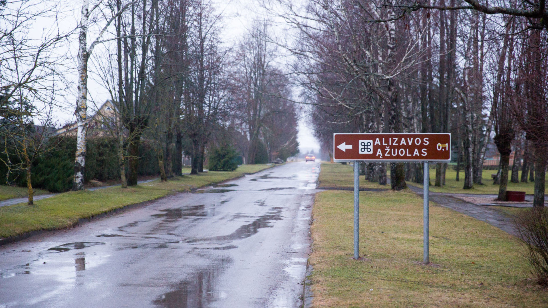 Nuoroda Alizavoje